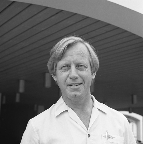 Sipke van der Land in AVRO's Sterrenslag